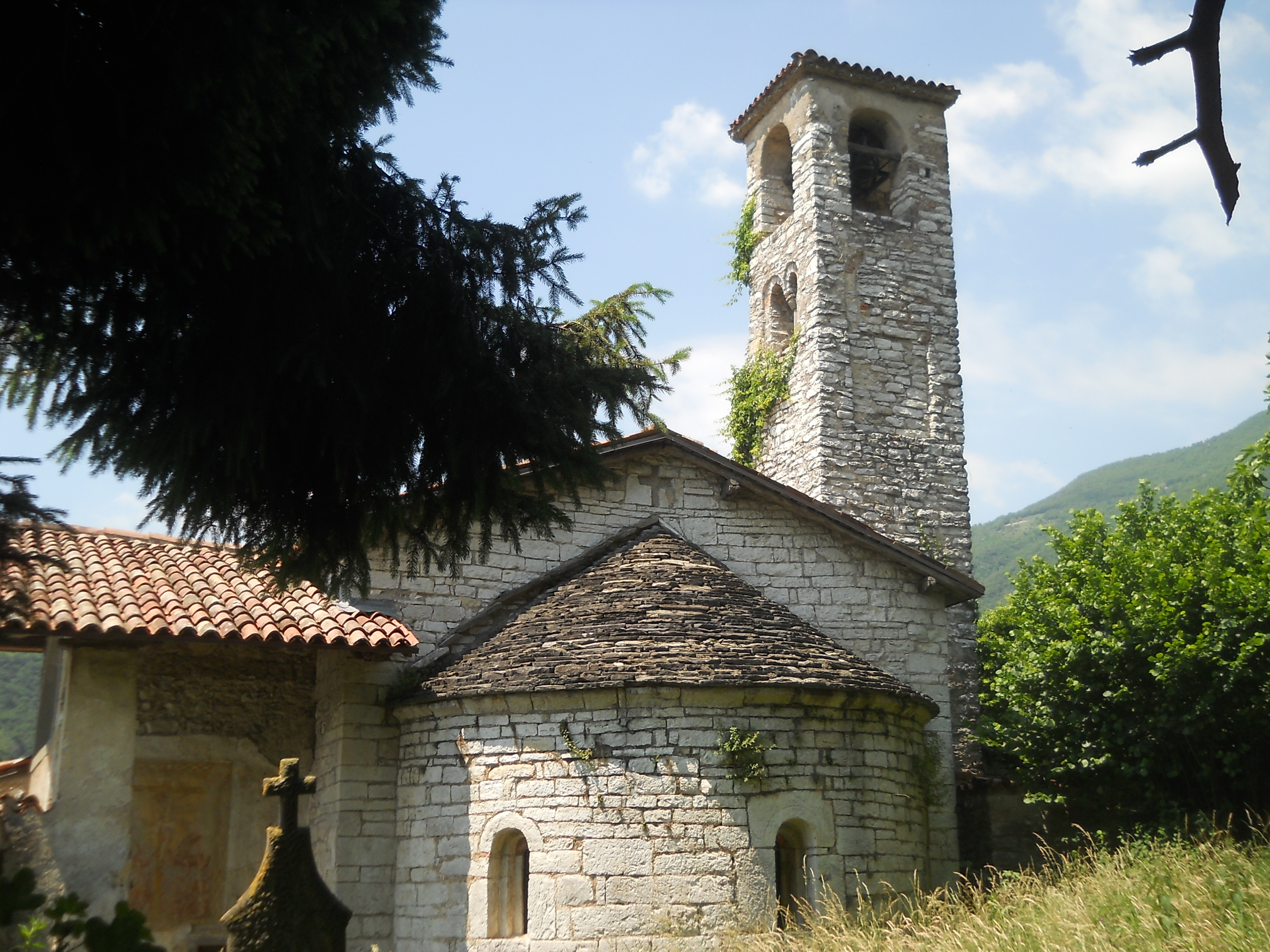 Abside della chiesa romanica del complesso di Sant'Alessandro in Canzanica ad Adrara San Martino